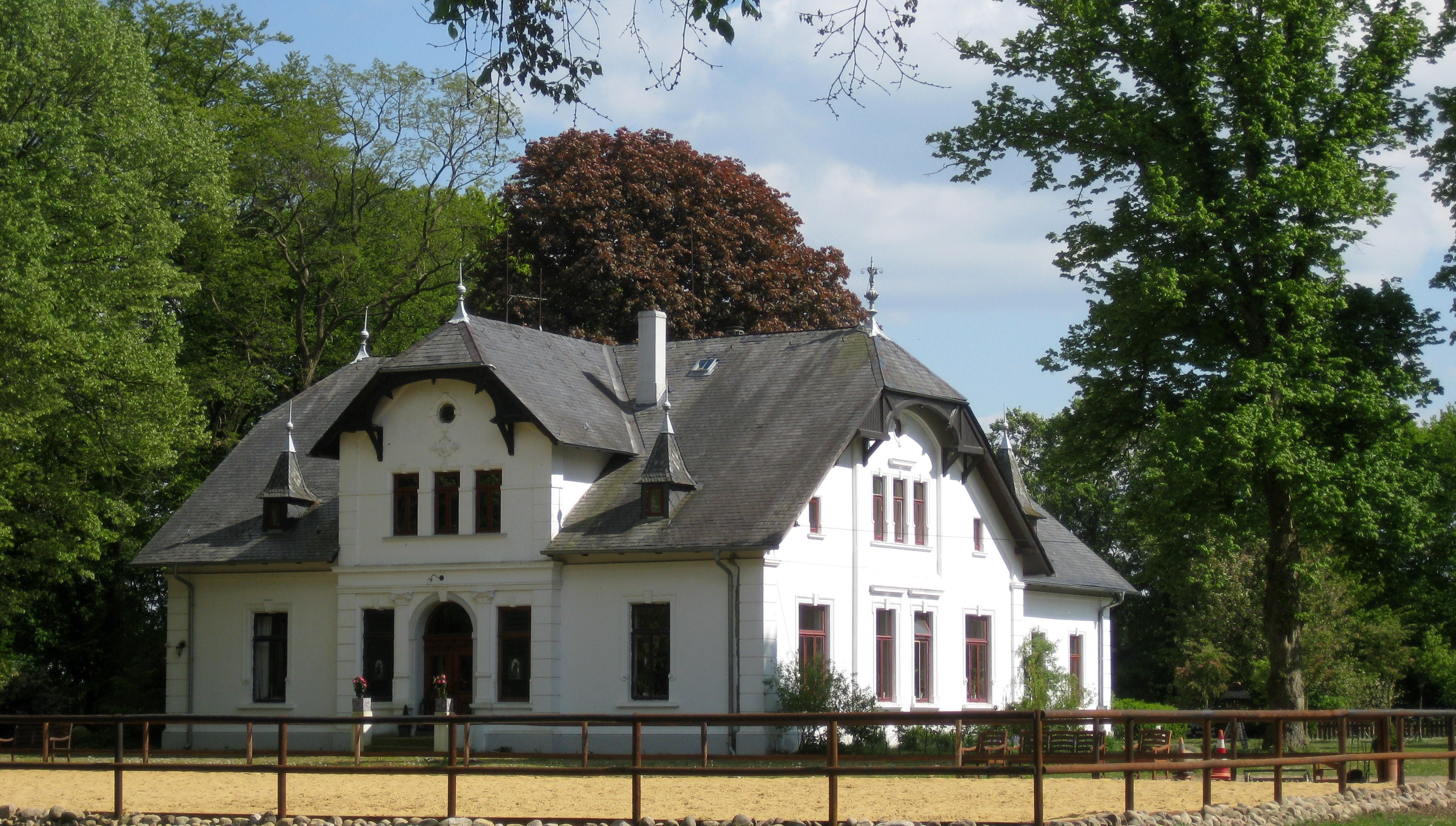 Wohnhaus von 1895 des Gutes Freschluneberg